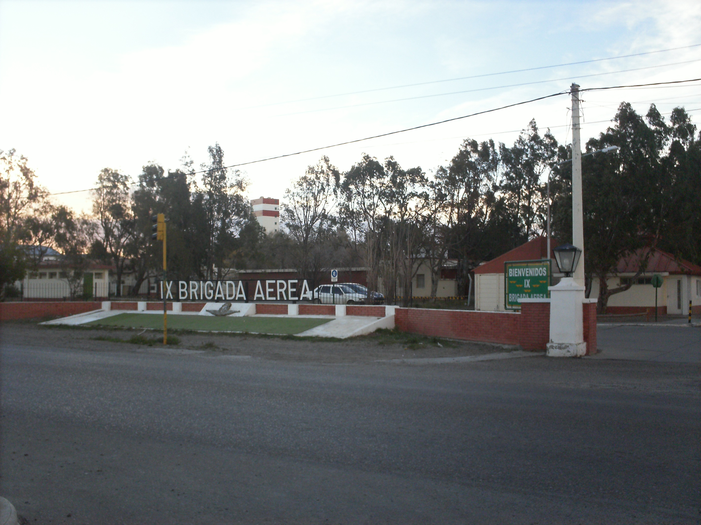 la brigada aerea en el barrio militar